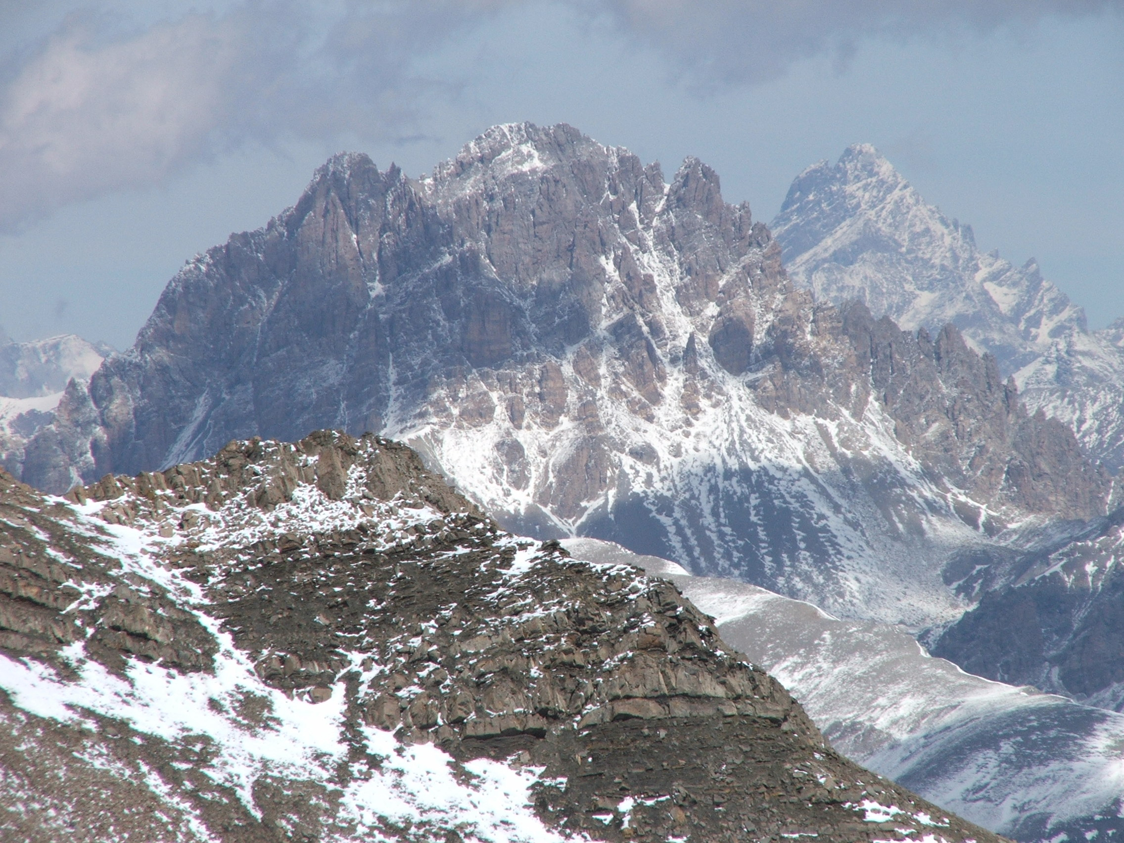 fatta da me